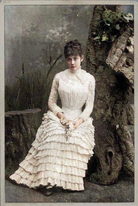 Älteste Tochter des Grafen Rudolph Chotek von Chotkow (* 1822, † 1903)